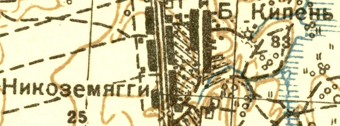 Топографическая карта Ленинградской области, квадрат О-35-12-Г (Ропша), деревня Нижняя Кипень